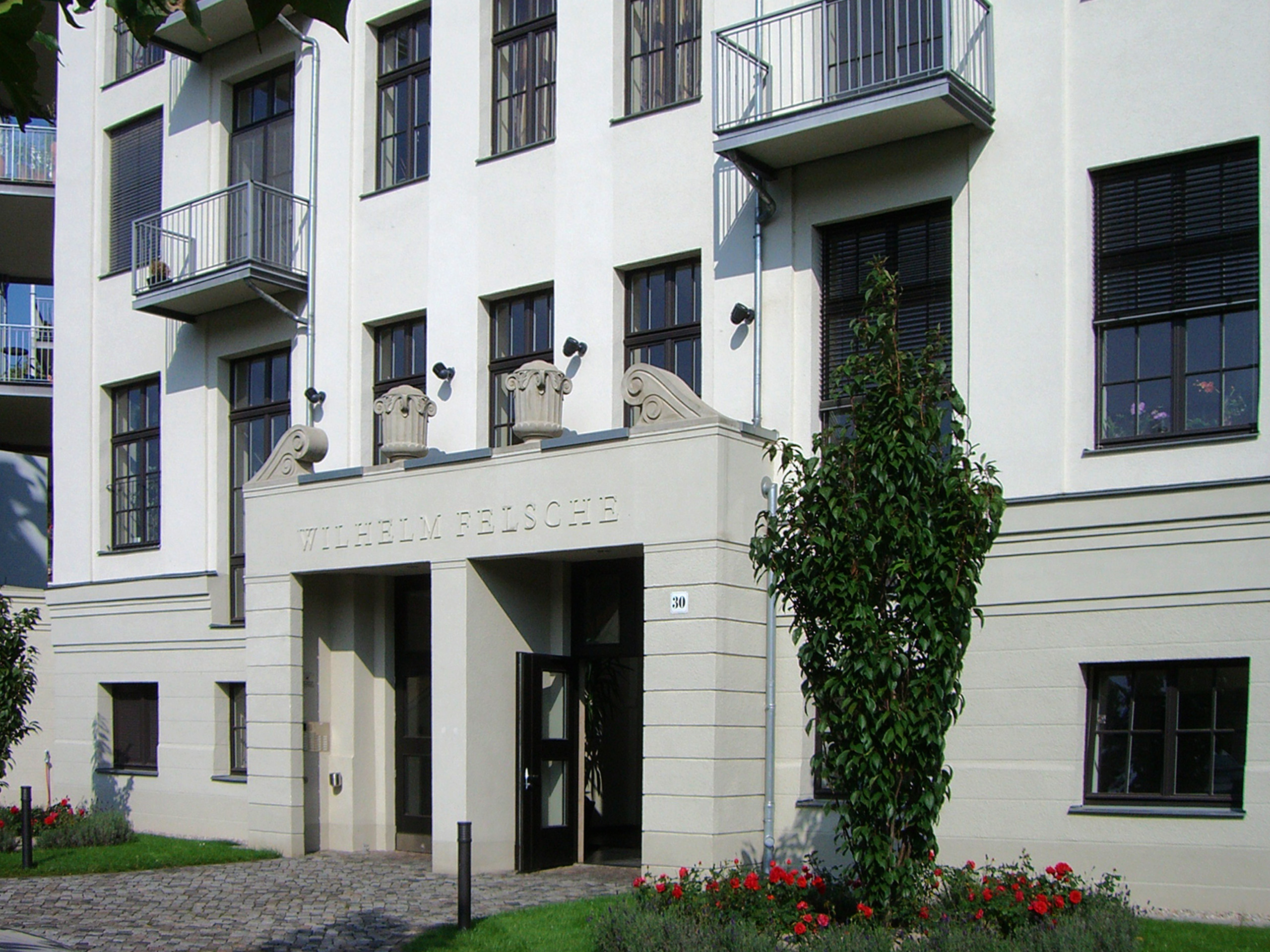 Schokoladen-Palais. Die als Schokoladenpalais bezeichnete Wohnanlage in Leipzig-Gohlis ist das ehemalige Betriebsgebäude der Schokoladenfabrik Wilhelm Felsche